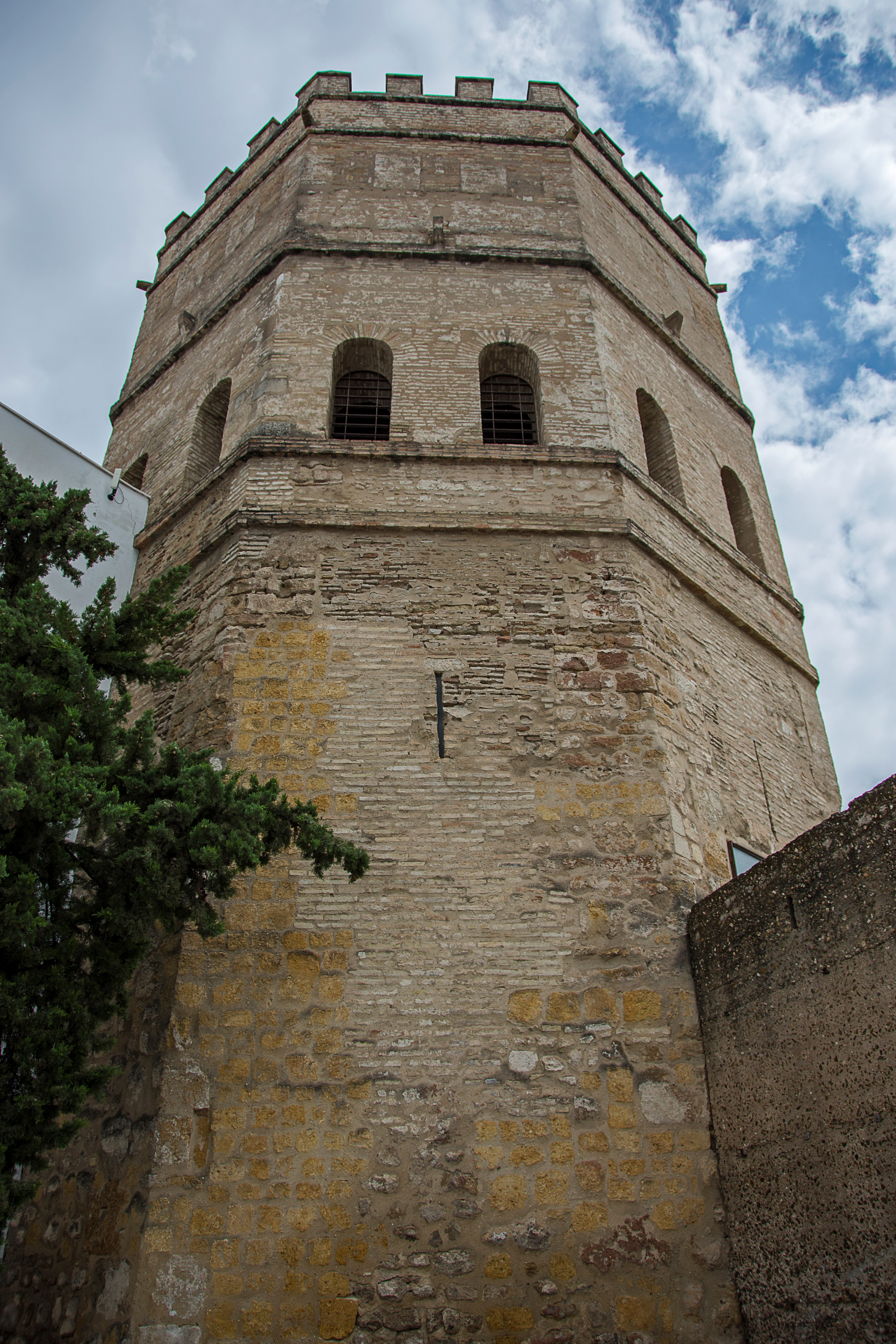 La Torre de la Plata, torre almohade de Sevilla (España), edificada hacia 1220.